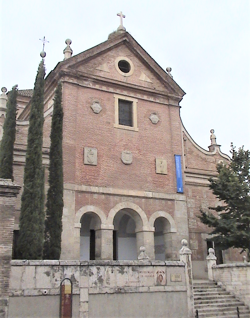 Actual Biblioteca central de la Universidad de Alcalá (en la calle Trinidad, nº 1 de Alcalá de Henares, Comunidad de Madrid, España). Originalmente Colegio-convento de Trinitarios Descalzos fundado en 1601 por San Juan Bautista de la Concepción, y construido entre 1626 y 1639. La edificación es atribuida a Sebastián de la Plaza.